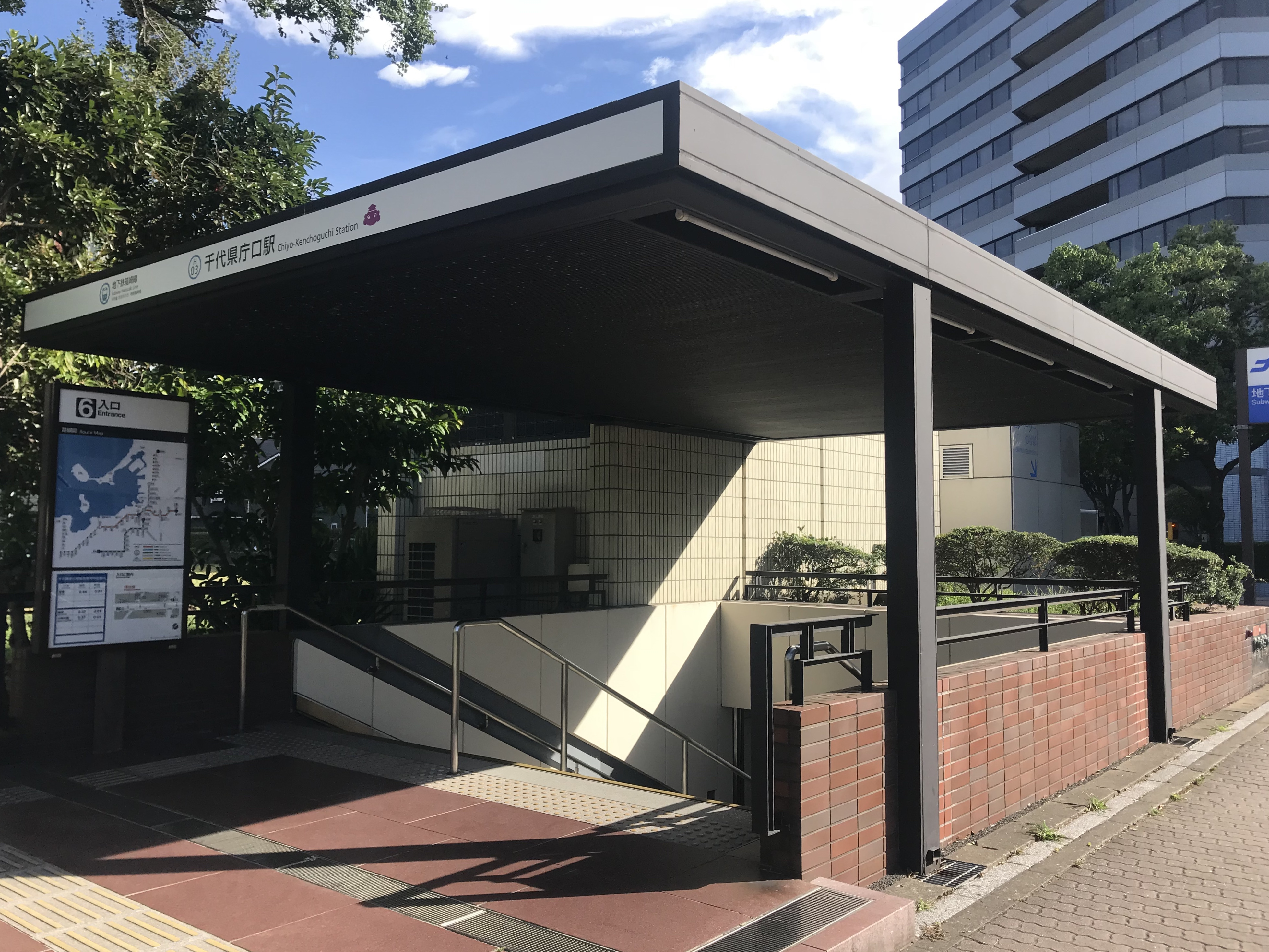 千代県庁口駅の6番出入り口